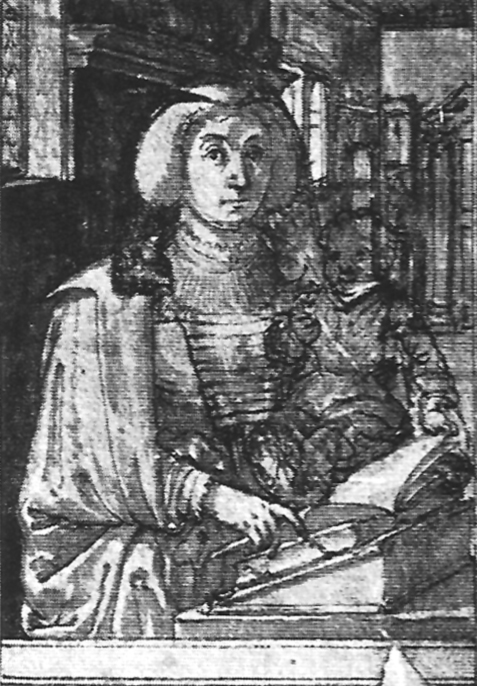 Vorzeichnung zum Bildnis der Gräfin Anna von Leiningen-Dachsburg; F16r1